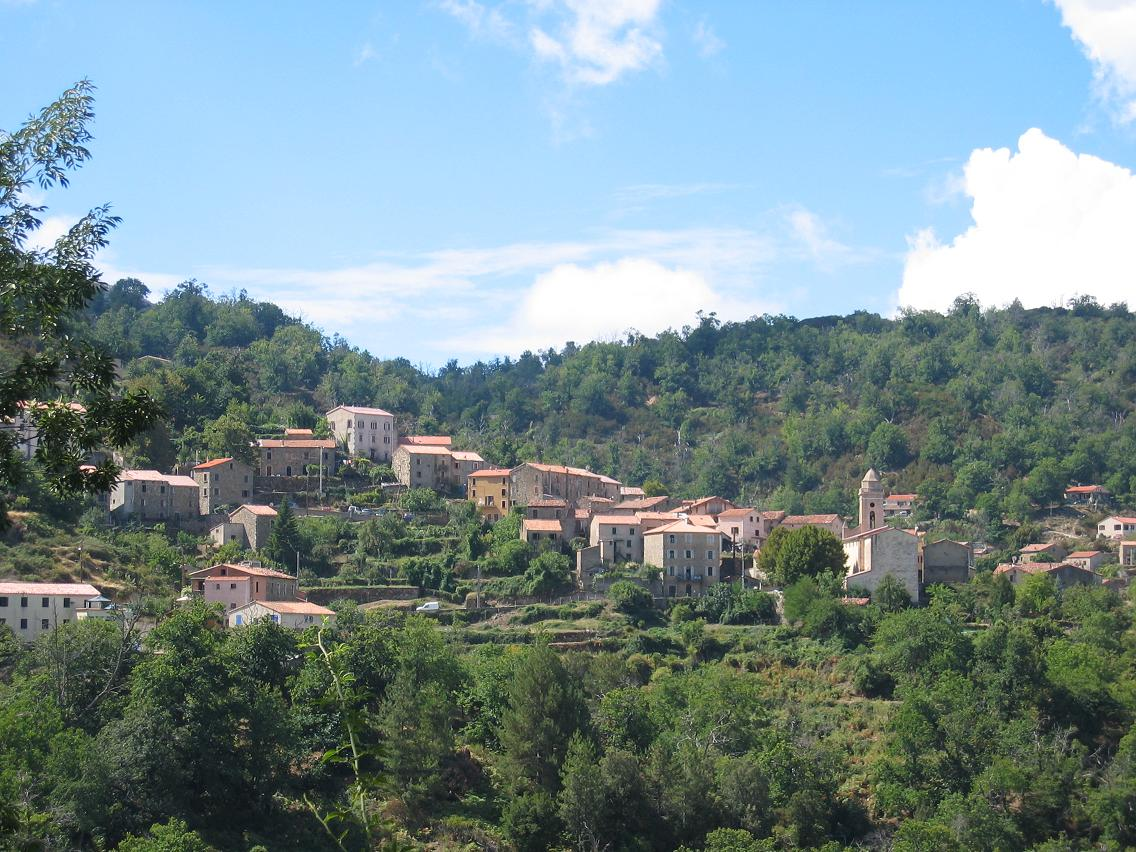 Paese di Marignana vistu da un andatu.